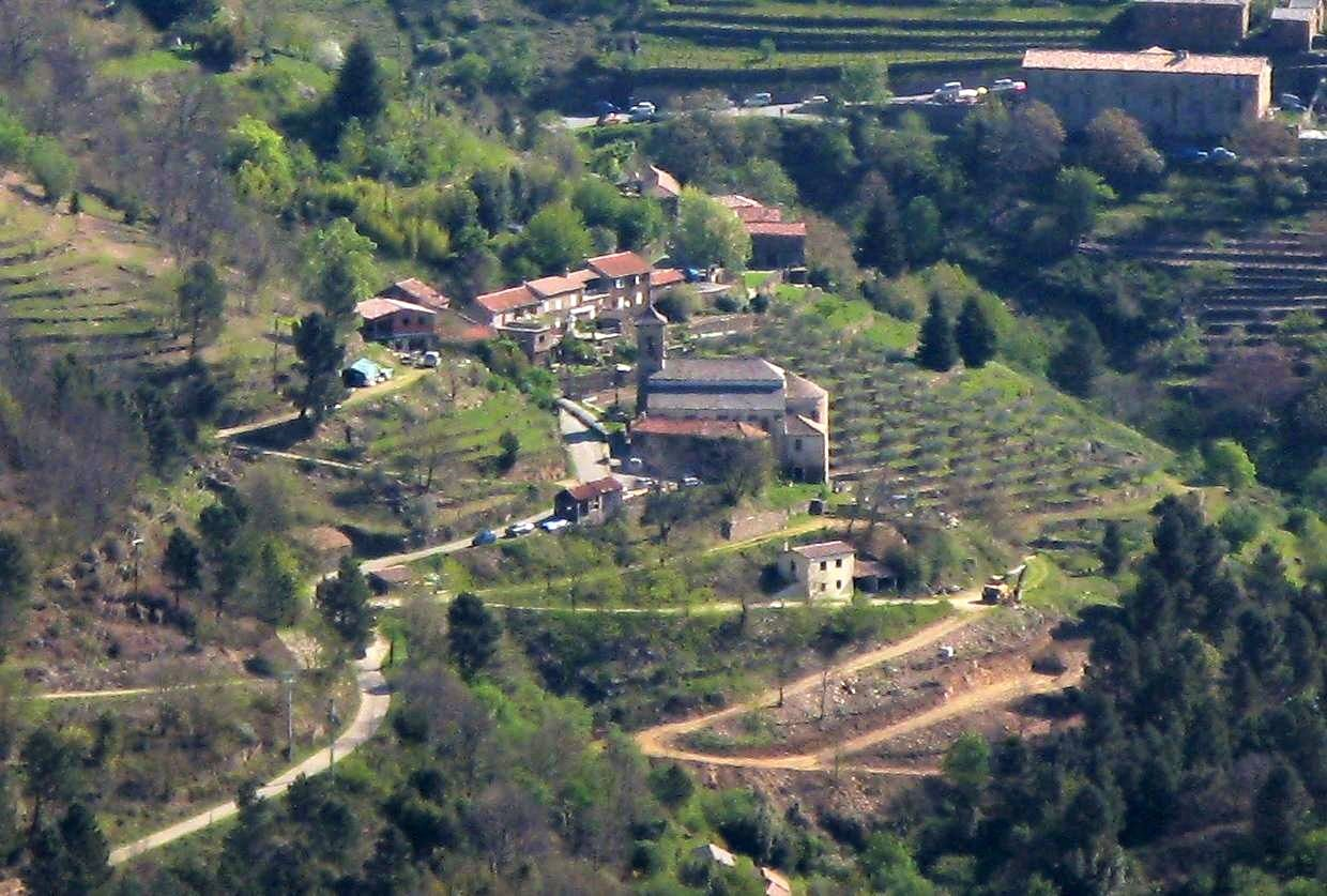 Village de Saint-Mélany (Ardèche)